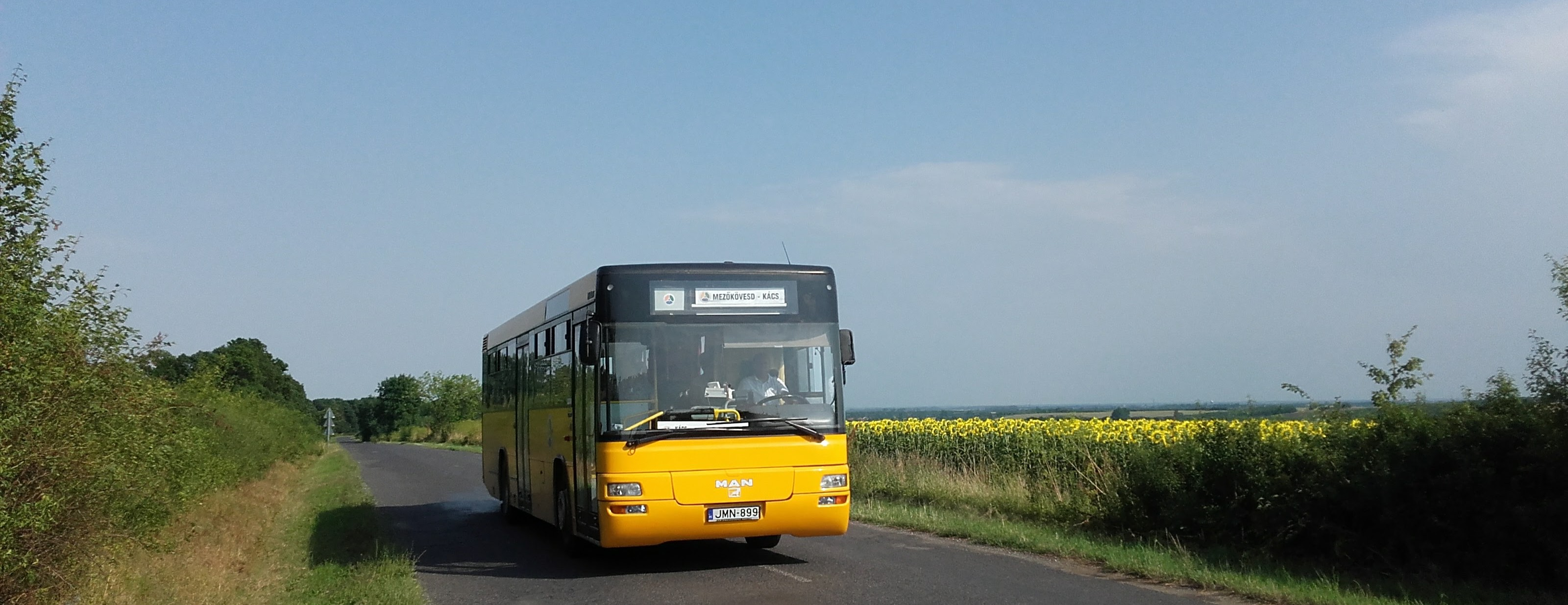 Az ÉMKK JMN-899-es rendszámú MAN SL 283 típusú busza Tibolddaróc és Bükkábrány közt, a 4007-es helyközi járaton.